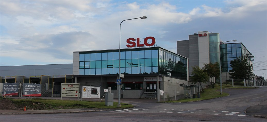 SLO Oy:n pääkonttori Vantaan Tuupakassa, Ylästön kaupunginosassa. SLO on suomalainen sähkö-, tele- ja automaatiotuotteiden toimittaja, joka kuuluu tytäryrityksenä suureen ranskalaiseen Sonepar-konserniin.